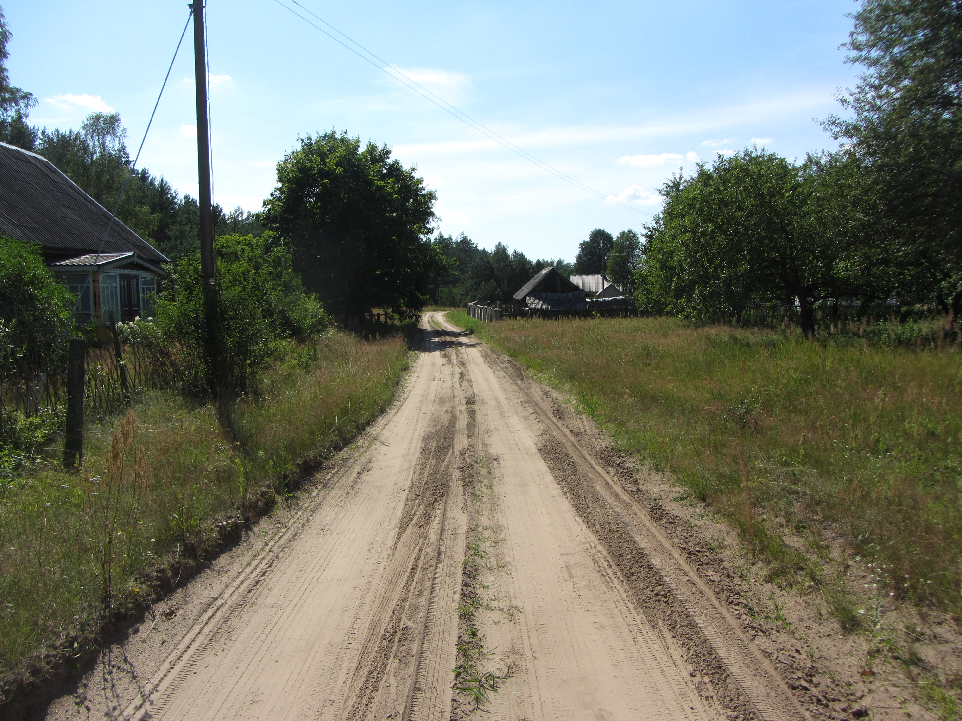 Kaniavos sen., Lithuania